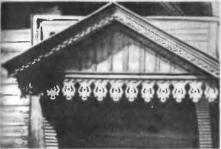 Магілёўская разьба. Фрагмент франтона жылога дома.